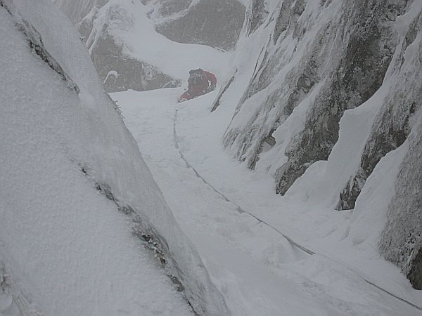 Goulotte de Spitzkopf, Vosges. Spitzkopf Gully, Vosges. florent Claude.